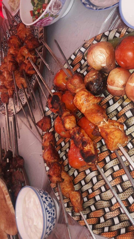 أحد الأطباق المشهورة في بلاد الشام عامة وفي الأردن خاصة